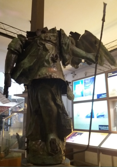 Segon àngel de la catedral, conservat al museu d'Història Datació: 1746 MHG